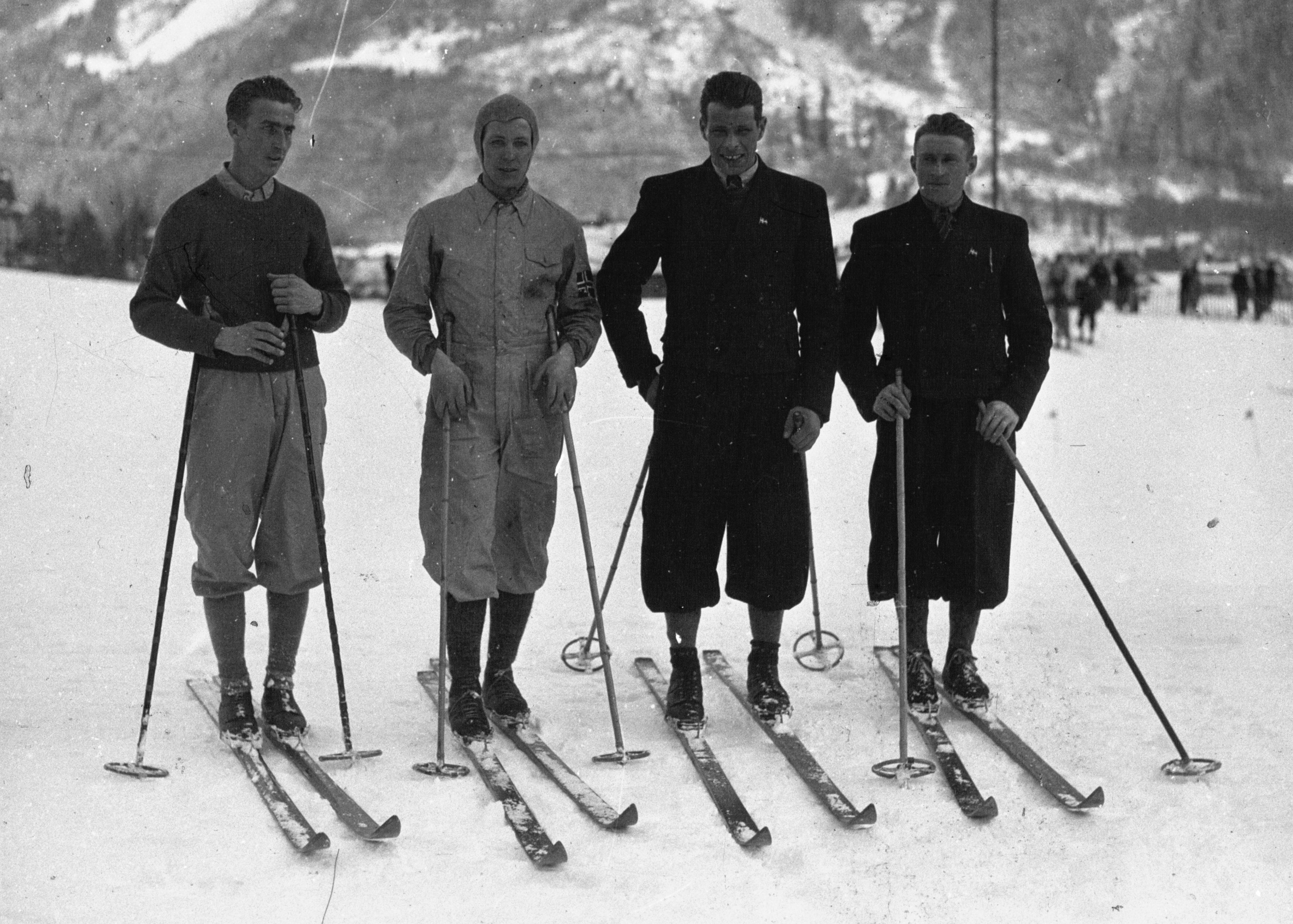 Chamonix : l'équipe norvégienne gagnante de la course de relais à ski : de gauche à droite, A. Ryen, Fredericksen, Røen, Bergendahl : [photographie de presse] / Agence Meurisse